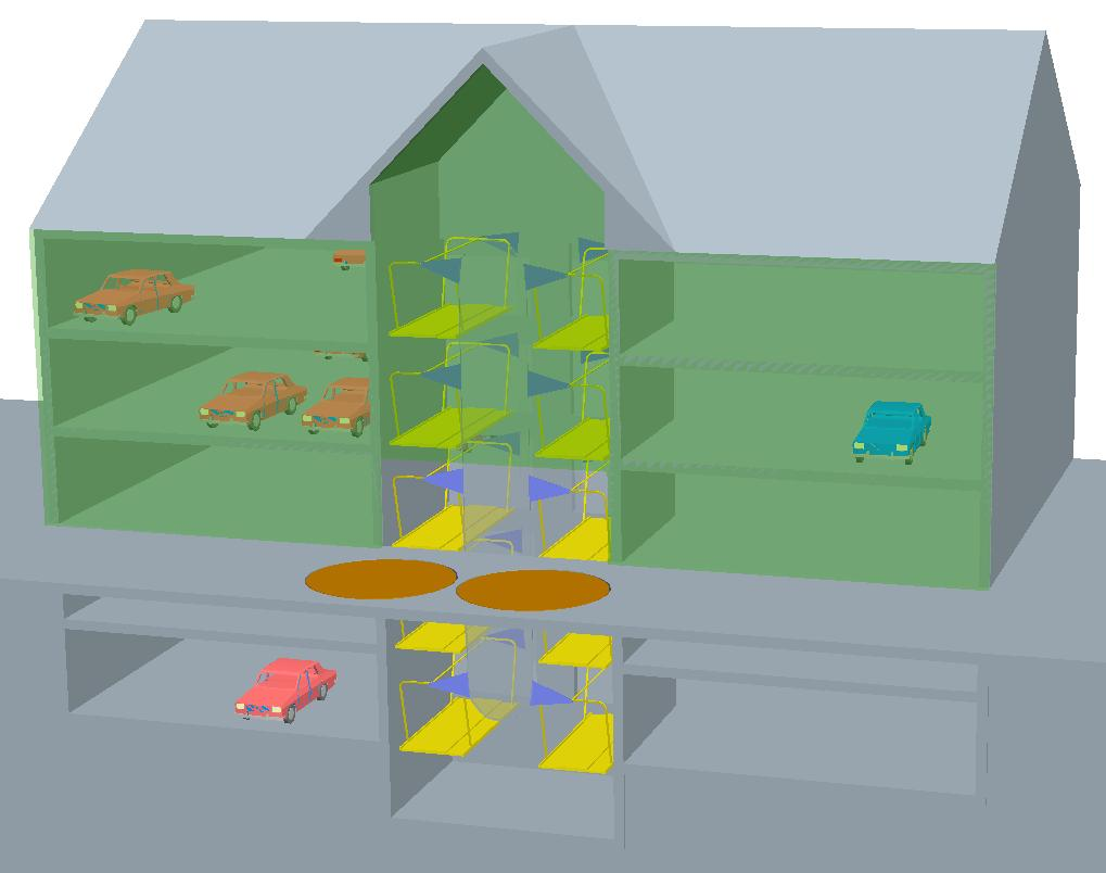 Подземно-надземное исполнение автомобильного подъемника элеваторного типа, позволяющее одновременное перемещение до четырёх автомобилей (по два на каждой ветви) за одну транспортную операцию.